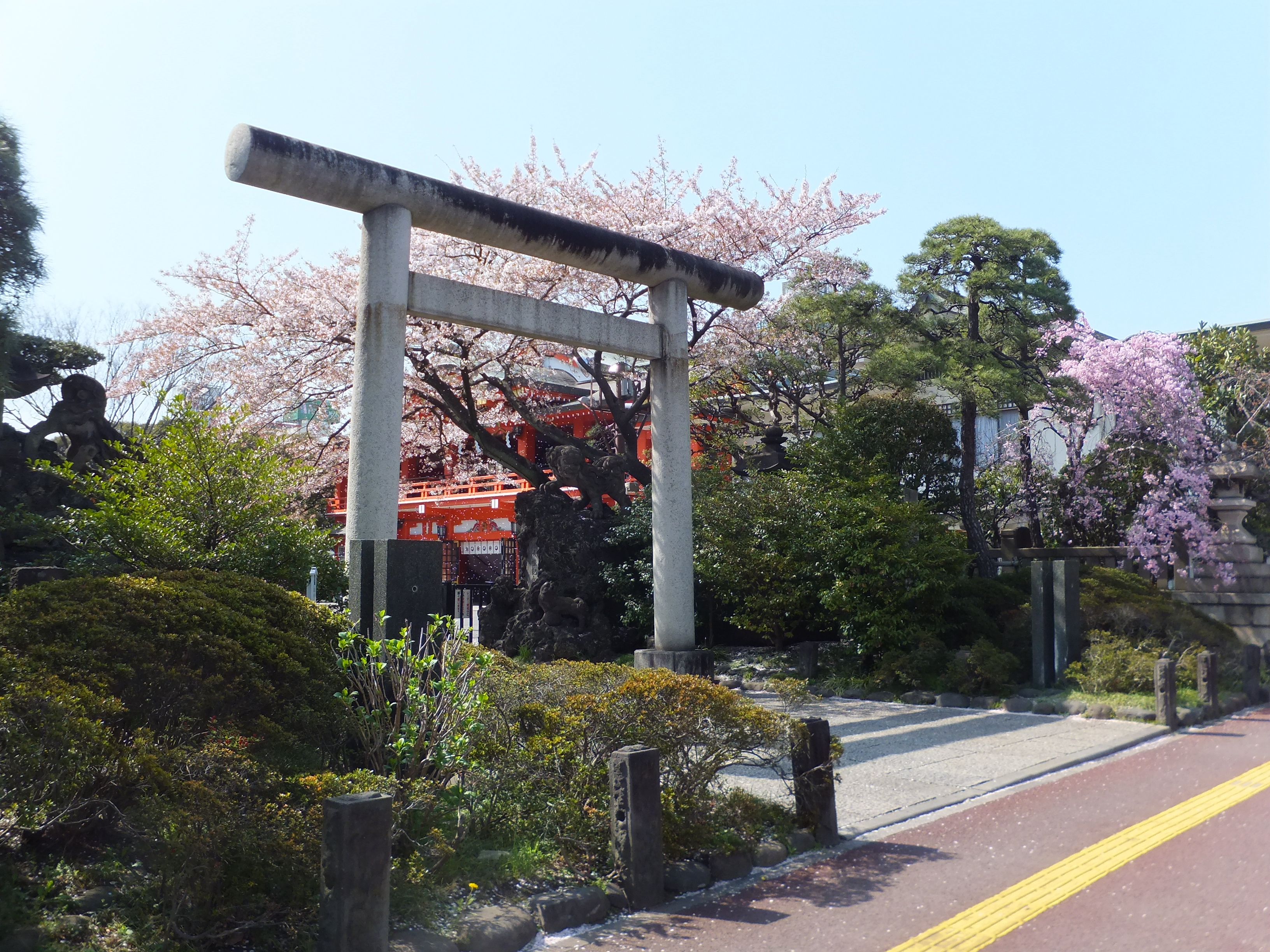 千葉神社鳥居